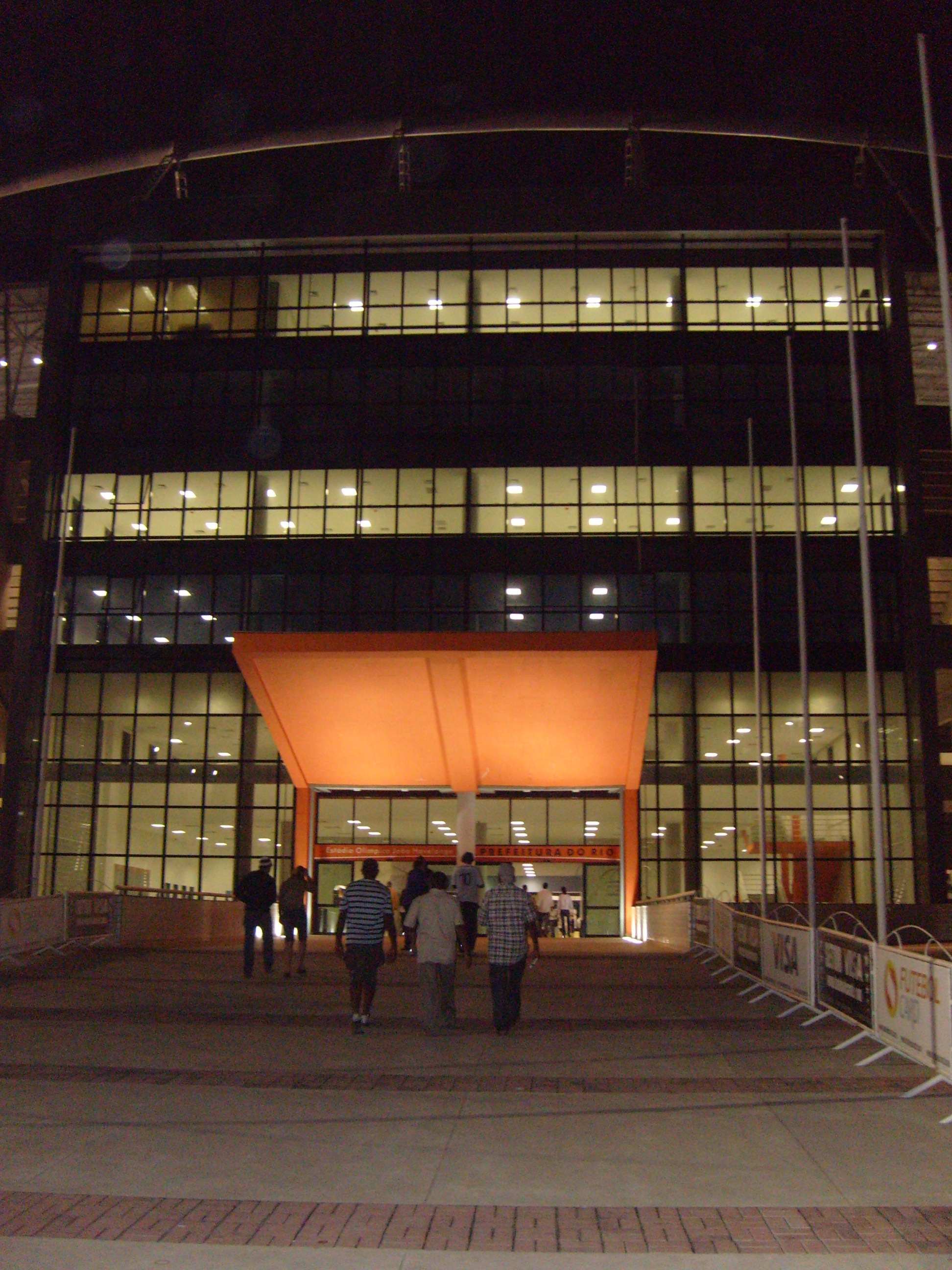 Foto do prédio administrativo do Estádio Olímpico João Havelange, o Engenhão.